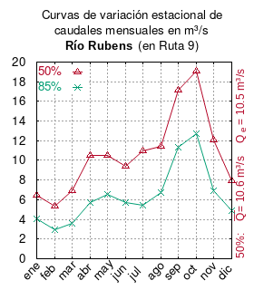 Curvas de variación estacional del río Rubens en Ruta 9. # # Estudio básico para desarrollar plan de riego en Región de Magallanes. Informe final. # Comisión Nacional de Riego # Ministerio de Agricultura # 2017 # url: # urlarchivo: # Tabla 4-7 Resultados de análisis de frecuencia de caudales medios mensuales (m3/s) seleccionados en la Región de Magallanes y Antártica Chilena, pág. 115 mes 50% 85% ene 6.45 4.10 feb 5.31 2.99 mar 6.94 3.62 abr 10.49 5.67 may 10.51 6.50 jun 9.40 5.70 jul 11.00 5.40 ago 11.39 6.72 sep 17.12 11.32 oct 19.04 12.69 nov 12.09 6.92 dic 7.96 4.93 This plot was created with Gnuplot.